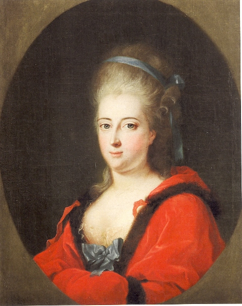 Philippine von Brandenburg-Schwedt, Landgräfin von Hessen-Kassel (1745-1800)title QS:P1476,de:"Philippine von Brandenburg-Schwedt, Landgräfin von Hessen-Kassel (1745-1800)" label QS:Lde,"Philippine von Brandenburg-Schwedt, Landgräfin von Hessen-Kassel (1745-1800)"